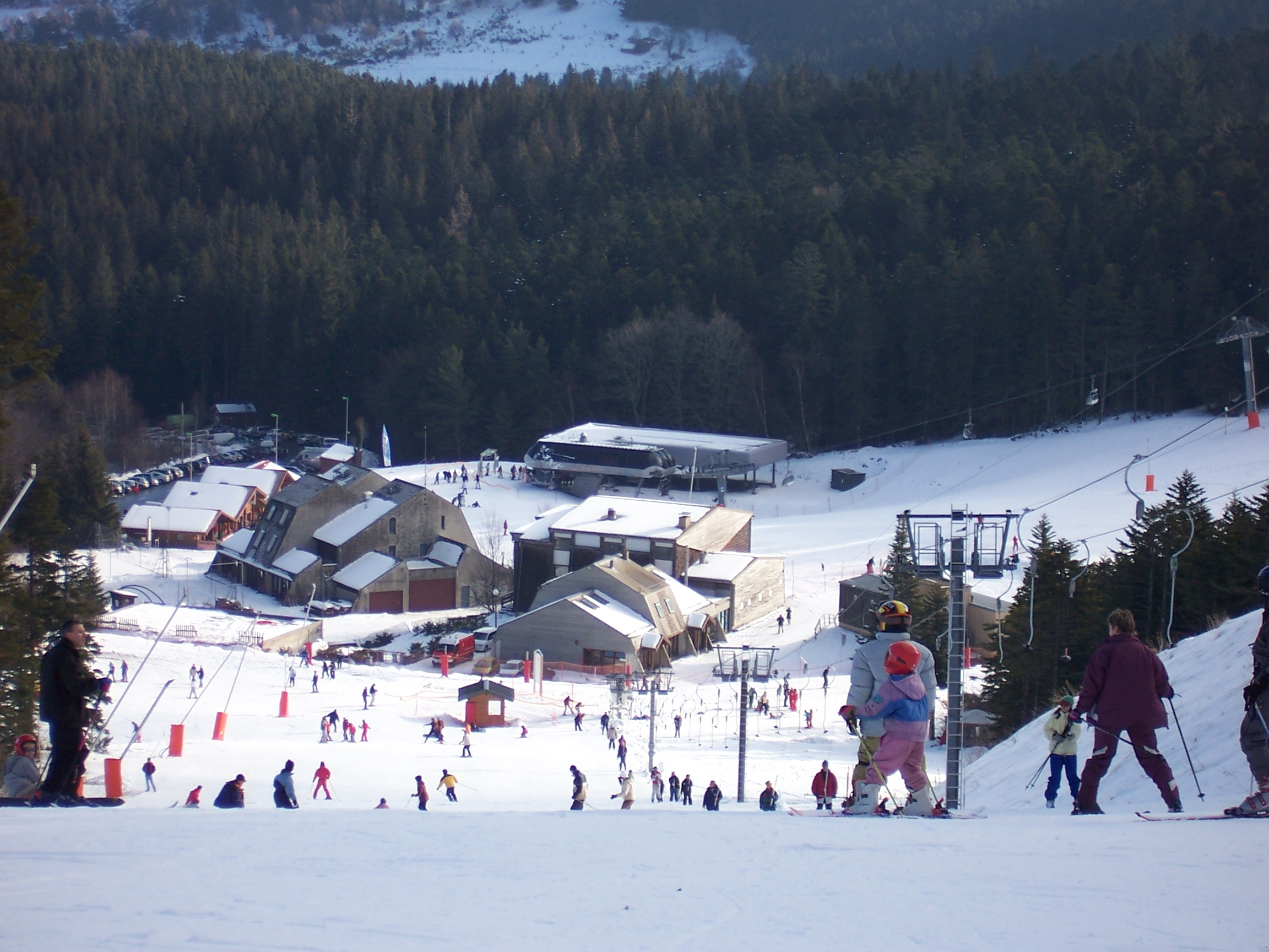 Station de Chalmazel